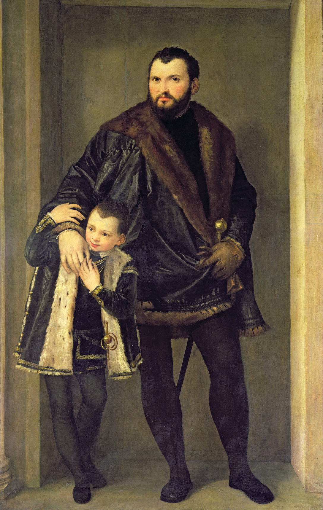 Iseppo da Porto e suo figlio Adriano, 1556 ca.; Firenze, Donazione Contini Bonacossi (Galleria degli Uffizi)